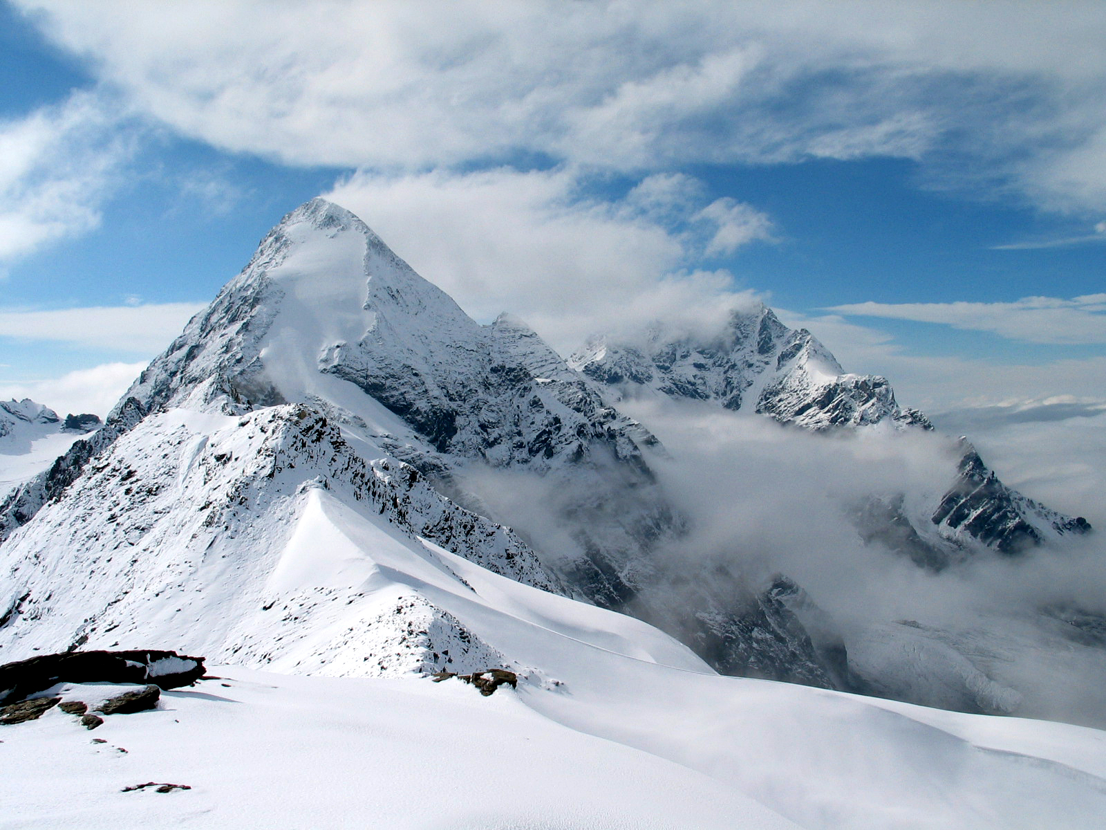 Gran Zebrù (3851 m)